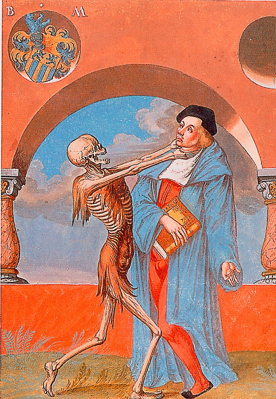 Bartholomäus May.